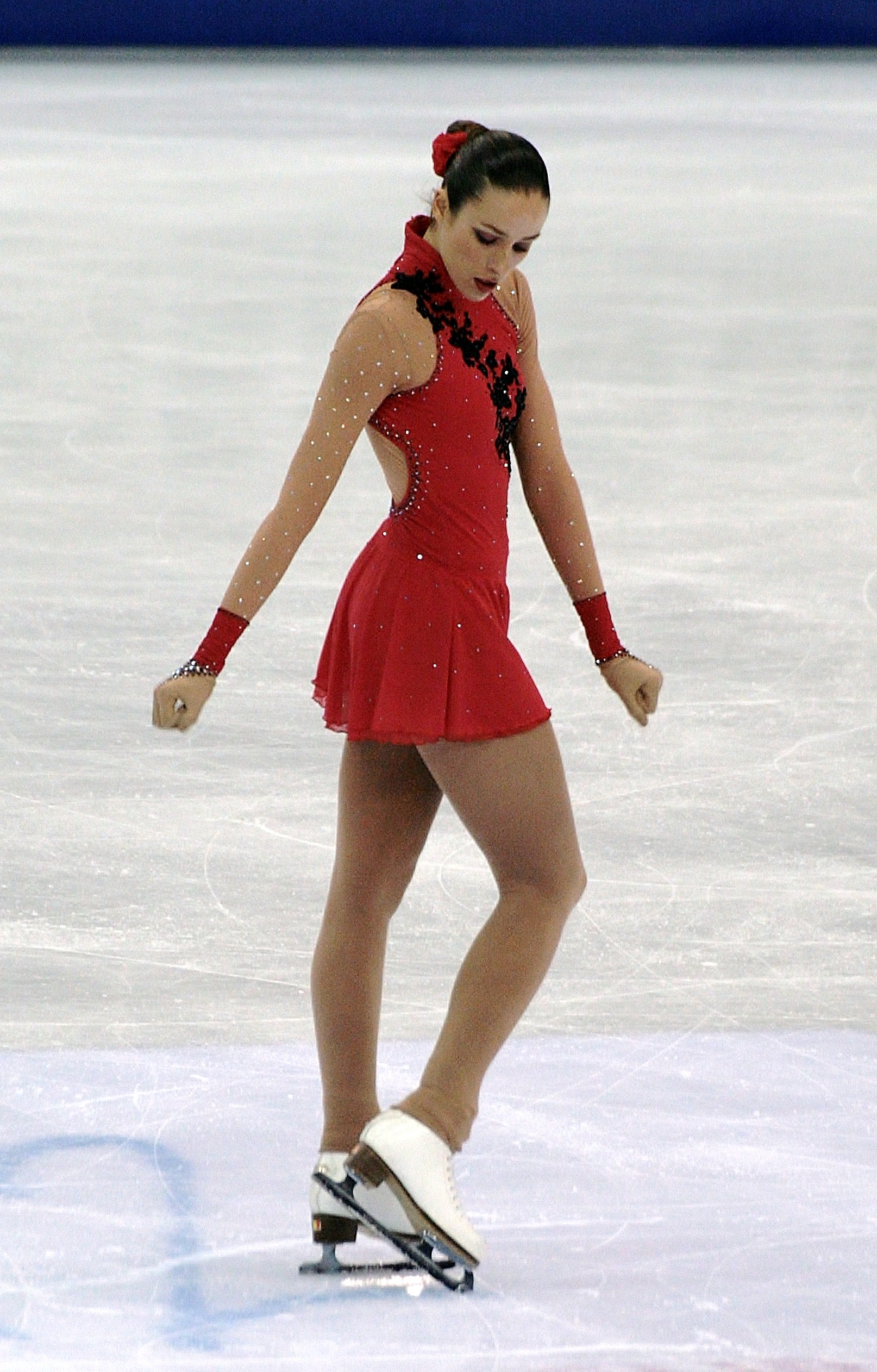 Изабель Пиман (Бельгия) на чемпионате мира по фигурному катанию 2012.